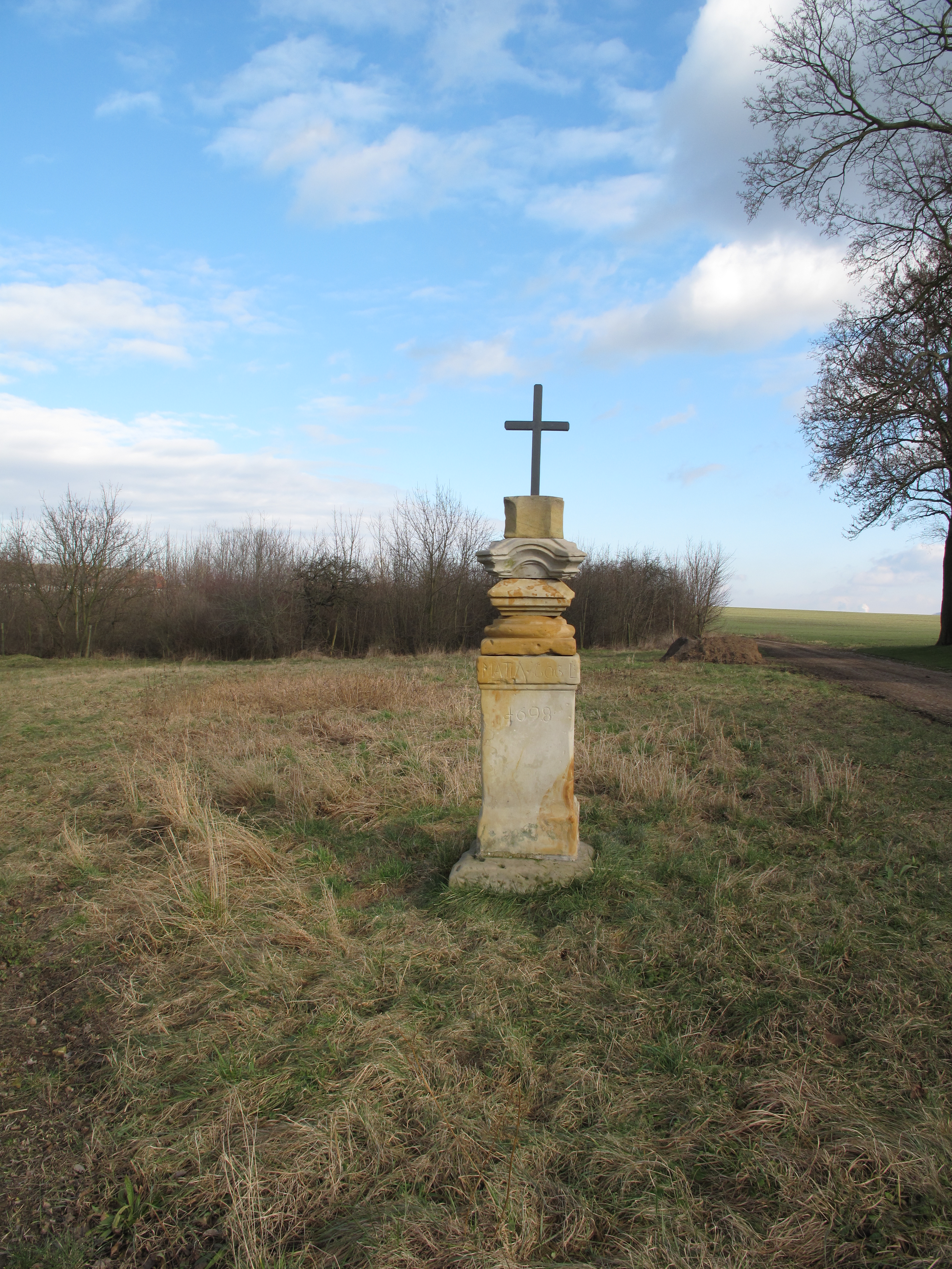 Křížek v Pohořicích. Okres Litoměřice, Česká republika.